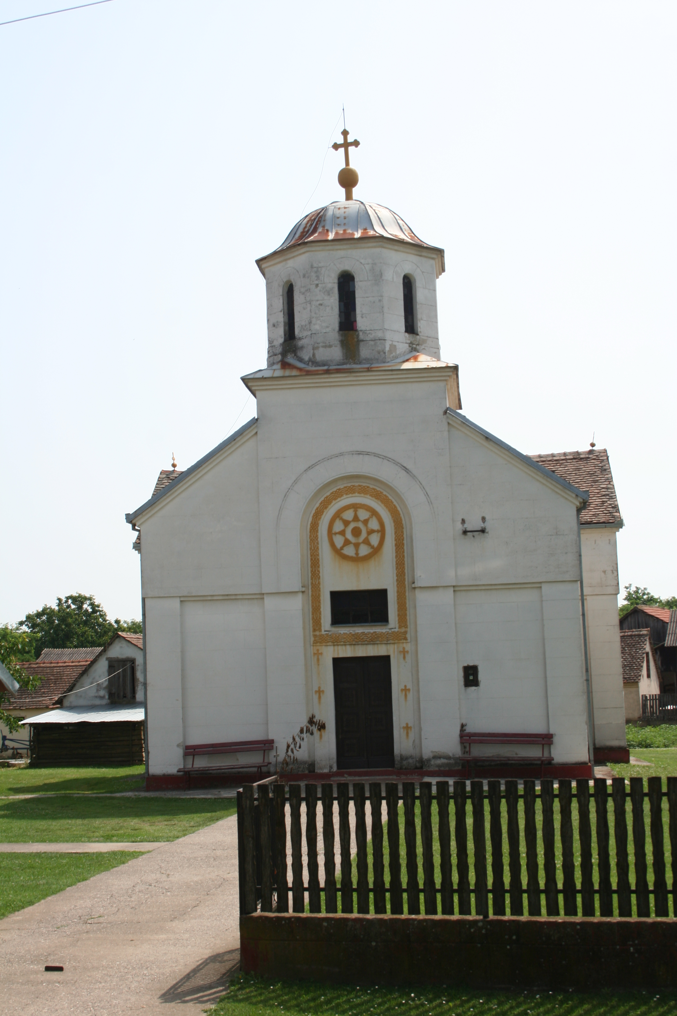 Crkva Svetog proroka Ilije, Banovo Polje